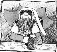 fantasy Zwerg